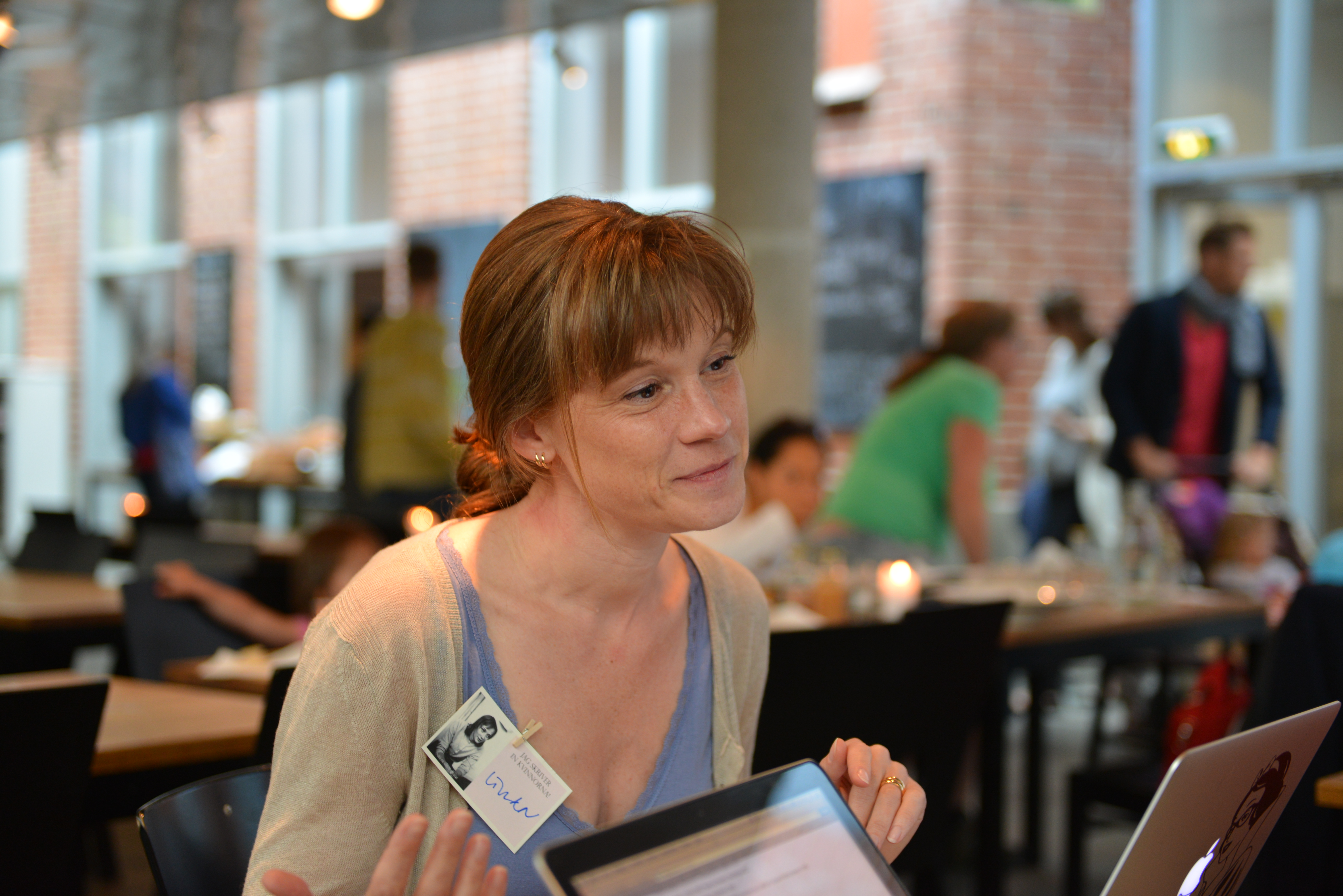 Konstvetaren Linda Fagerström